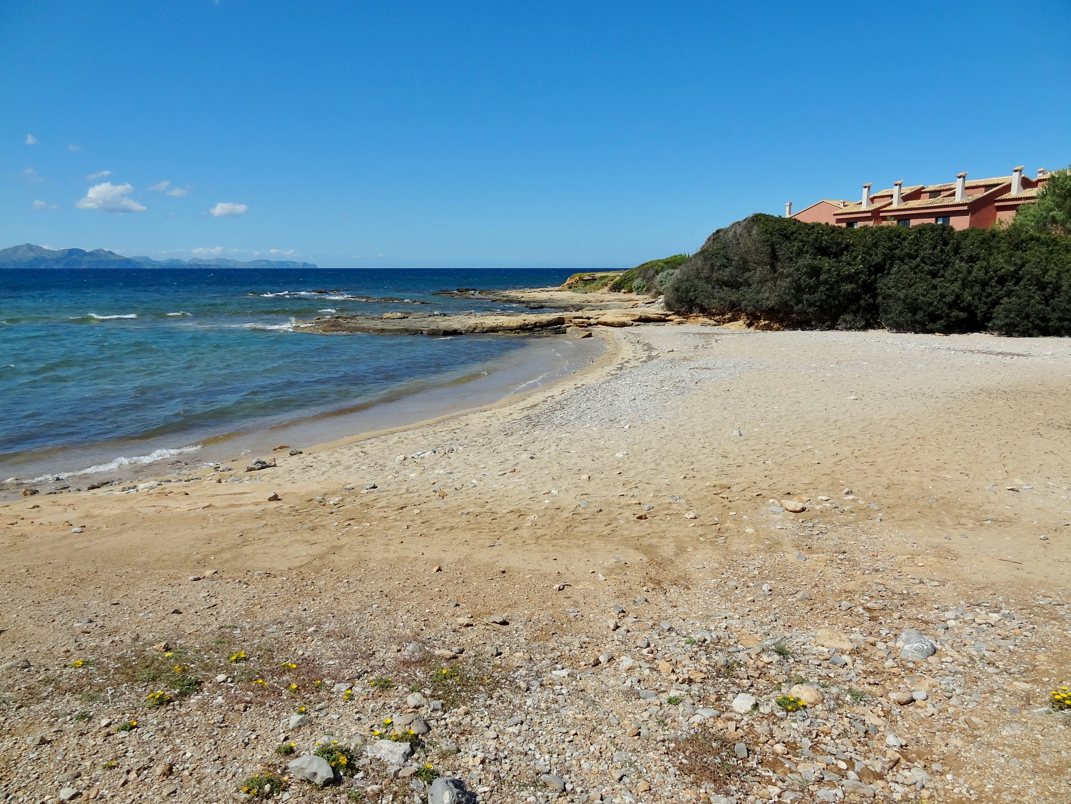 Platja de s’Estanyol, Strand in der Gemeinde Artà, Mallorca, Spanien